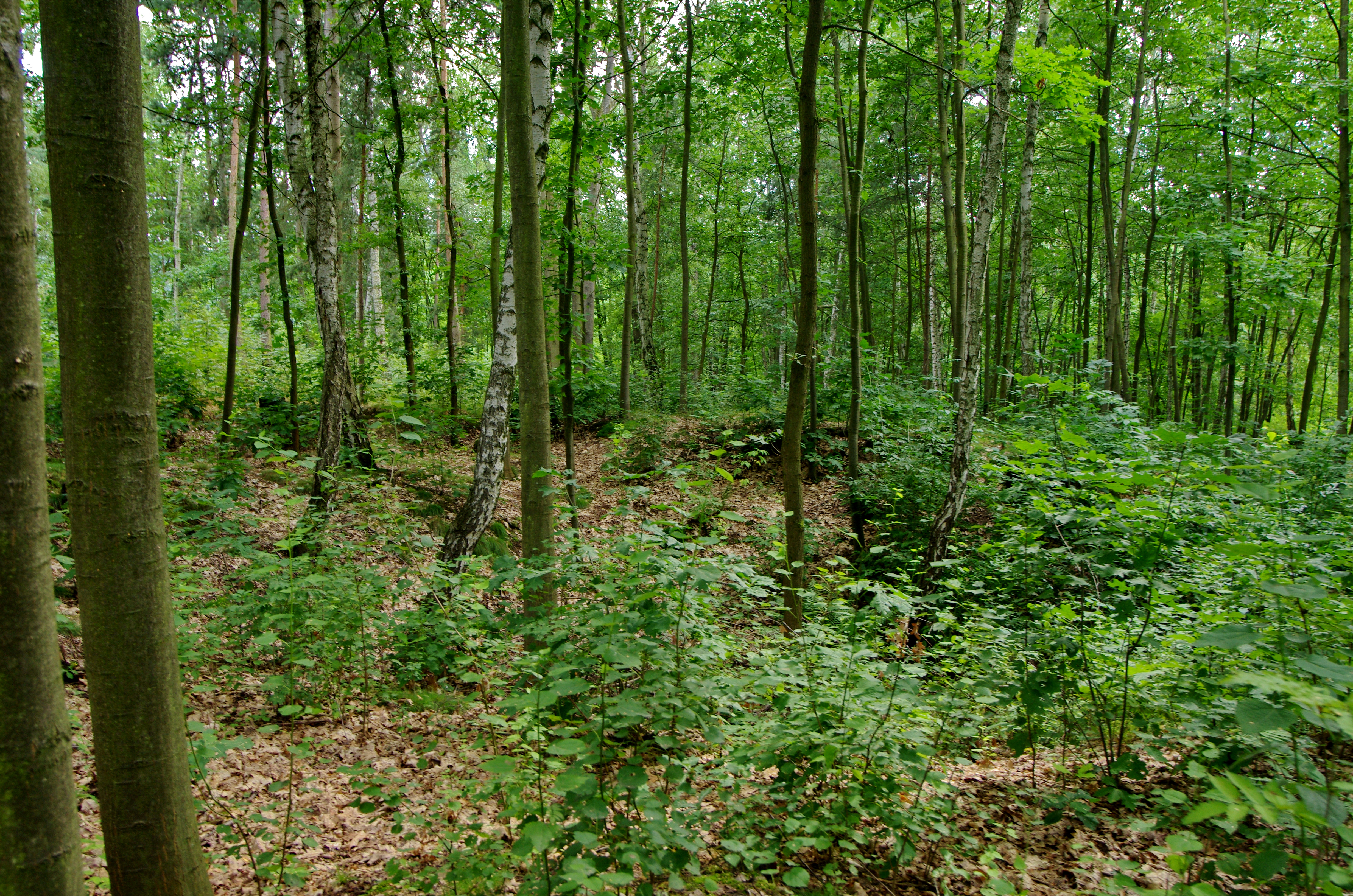 Tašovice, místní část Karlových Varů, archeologická rezervace